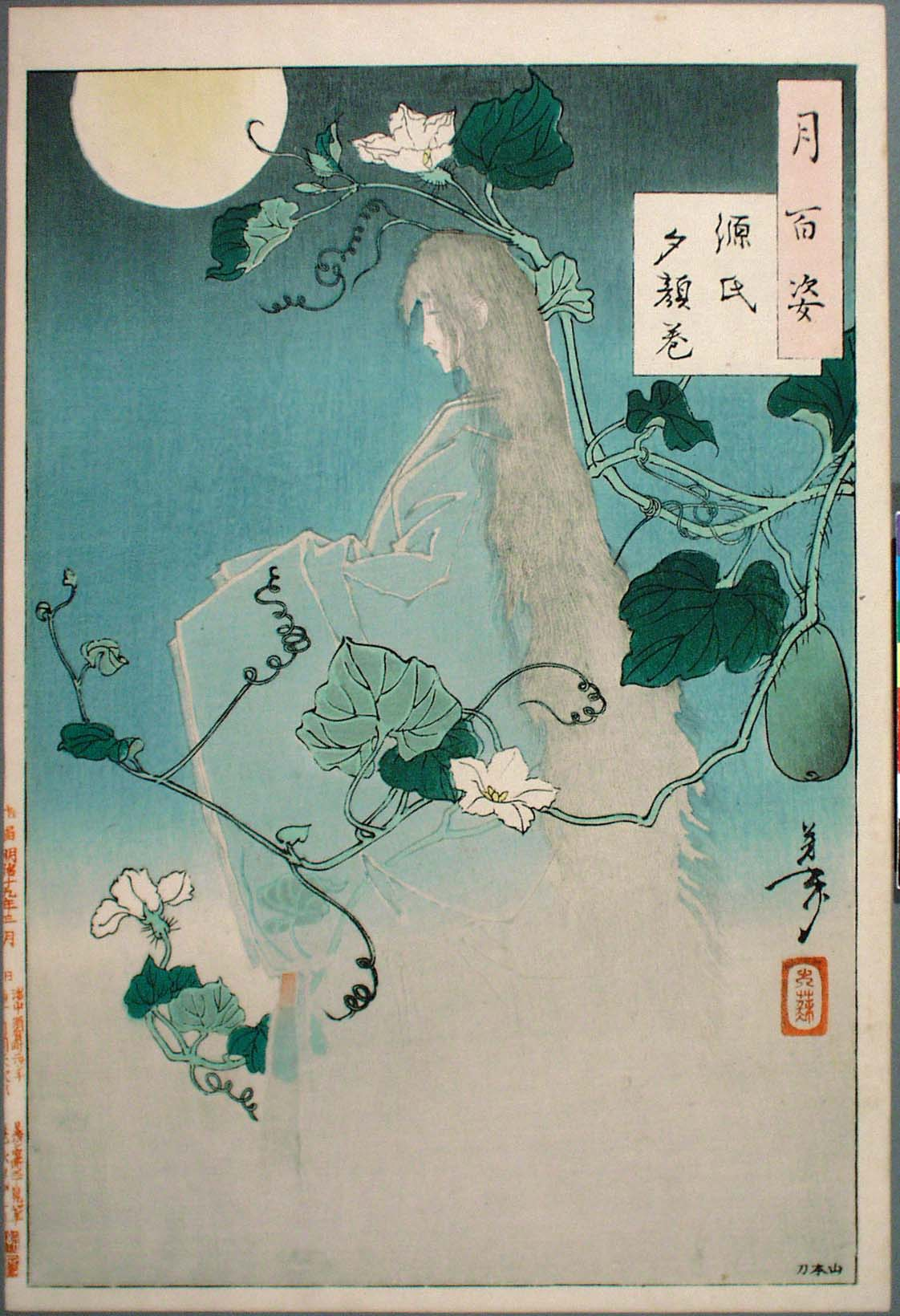 Le fantôme de Yugao